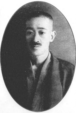 若尾謹之助